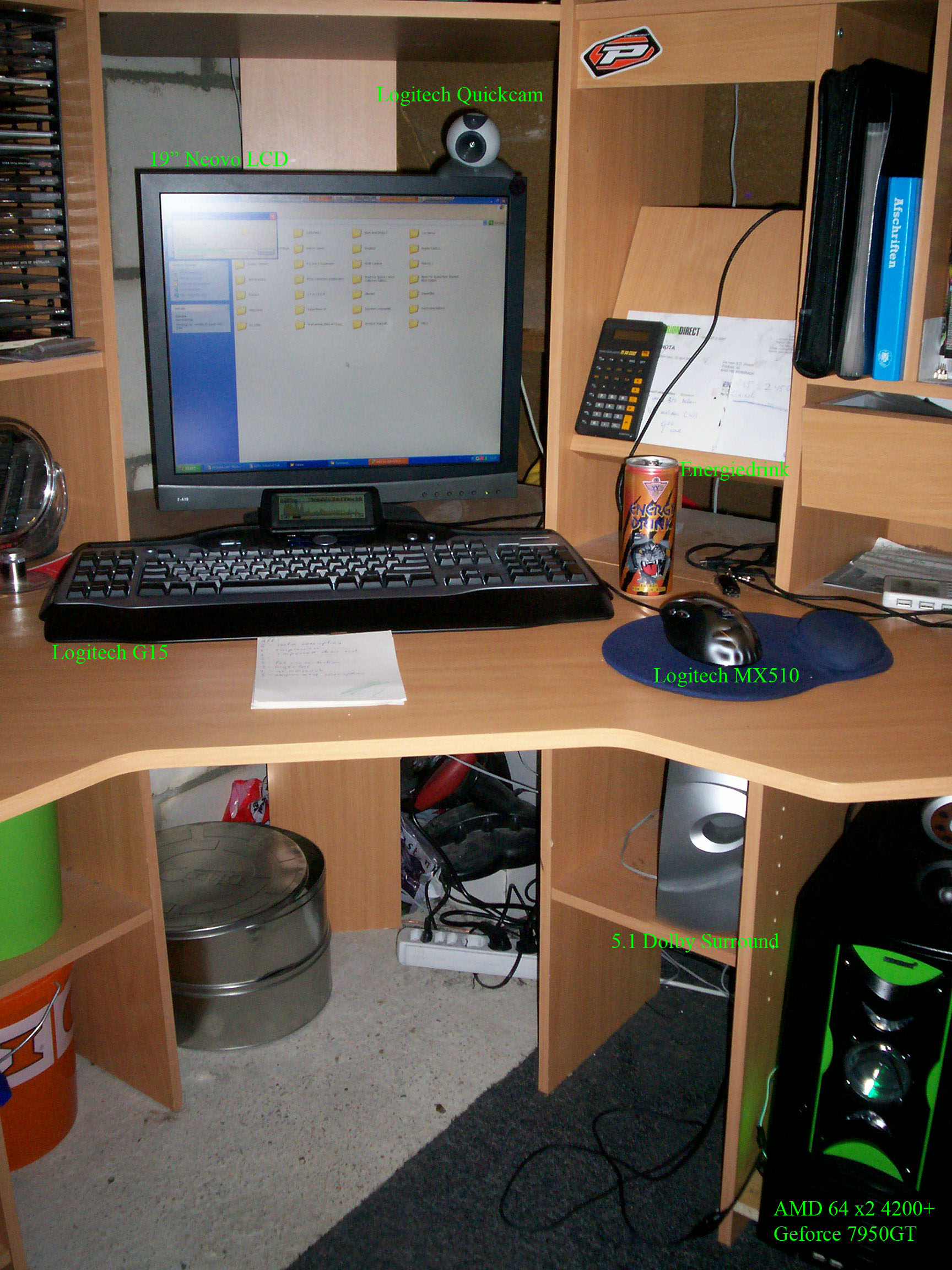 Darkfreak's Desktop